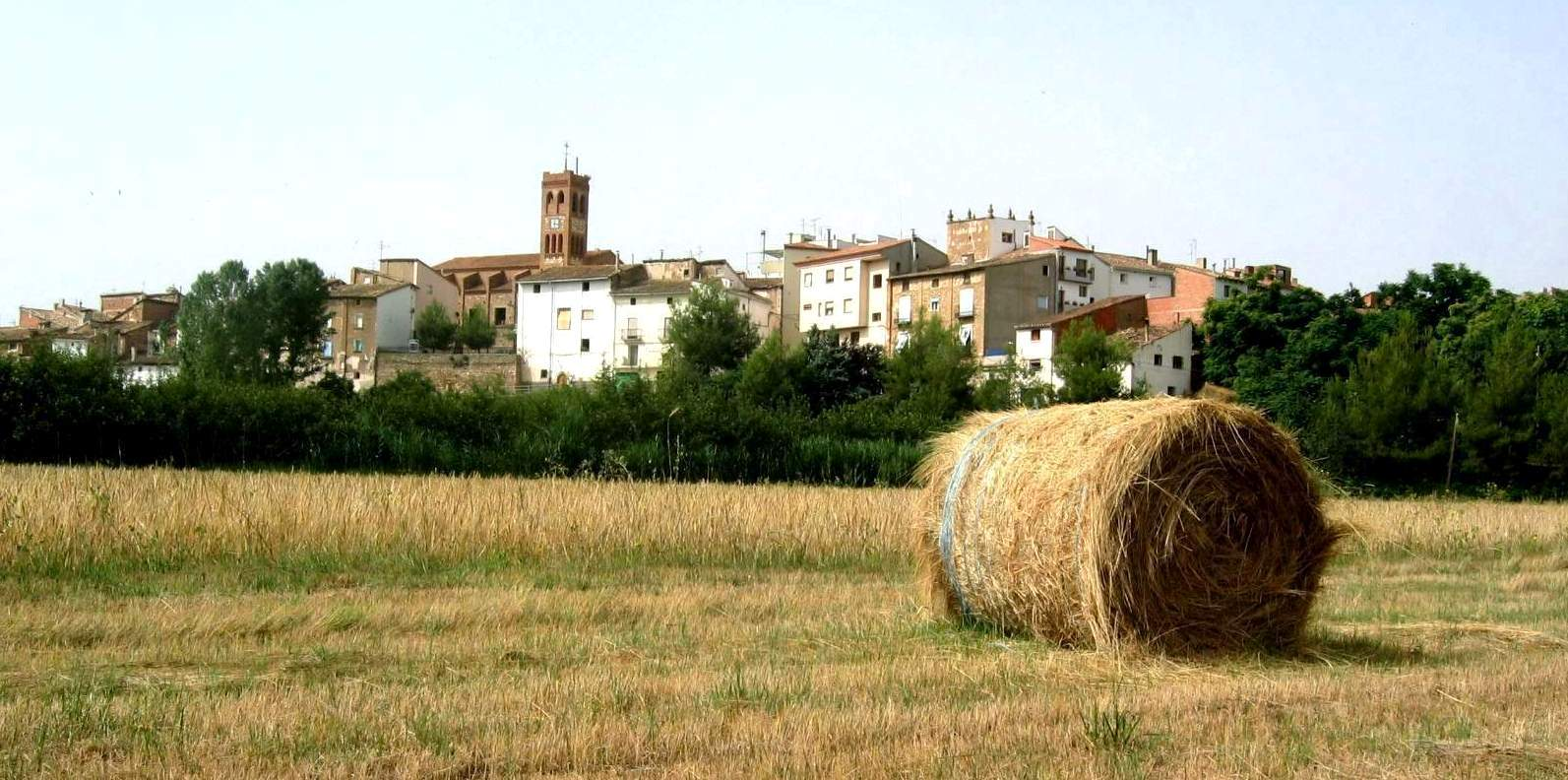 Vista parcial (nororiental) de Torrebaja (Valencia), desde la partida de El Rento, con detalle de rulo de paja tras la cosecha (2004).